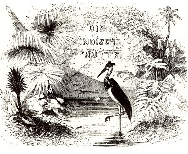 Illustration zu Jacques Henri Bernardin de Saint-Pierre: Die indische Hütte